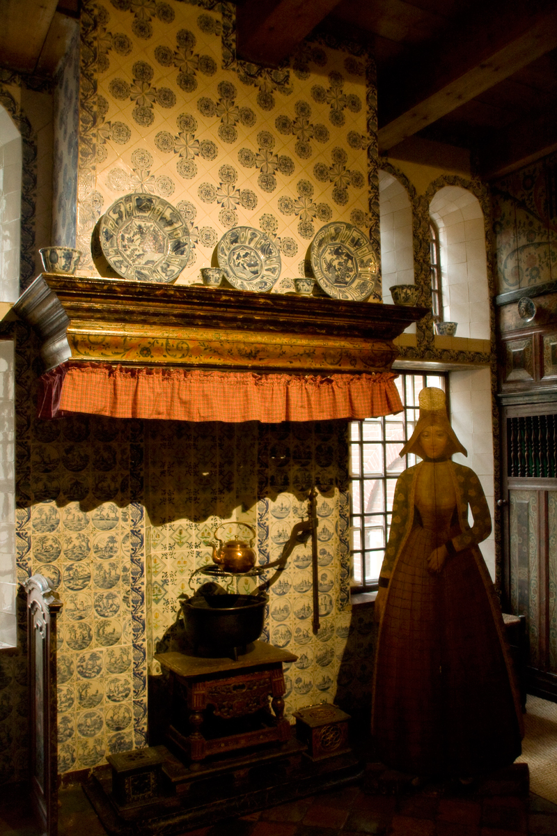 Hindelooper kamer Schouw, Hindelooper kamer